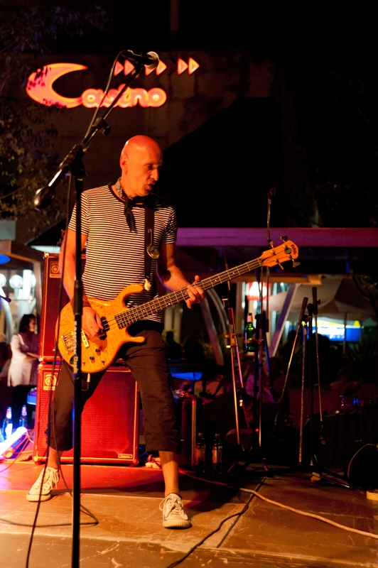 Davor Gobac i Psihomodo pop